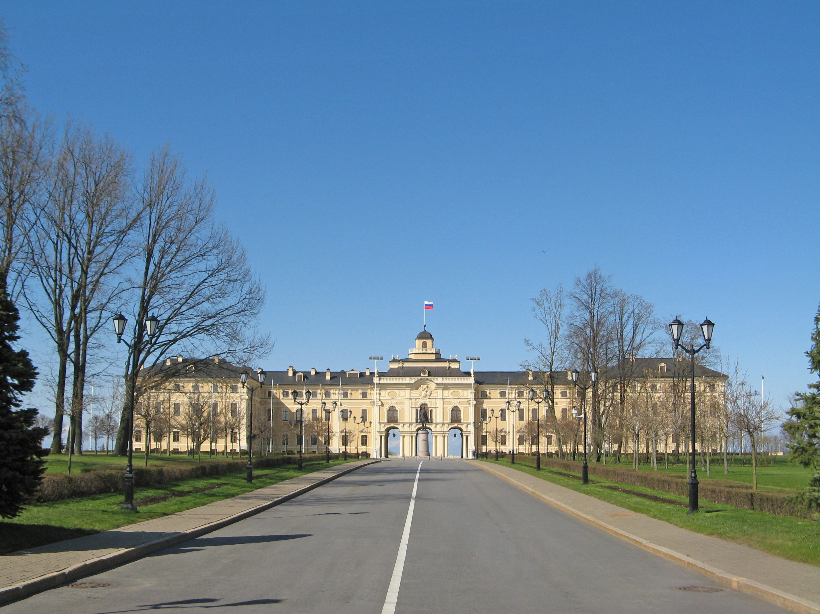 Дворец Стрельнинский (Константиновский) с террасами и гротом: Березовая аллея, 3, Стрельна, Петродворцовый район, Санкт-Петербург